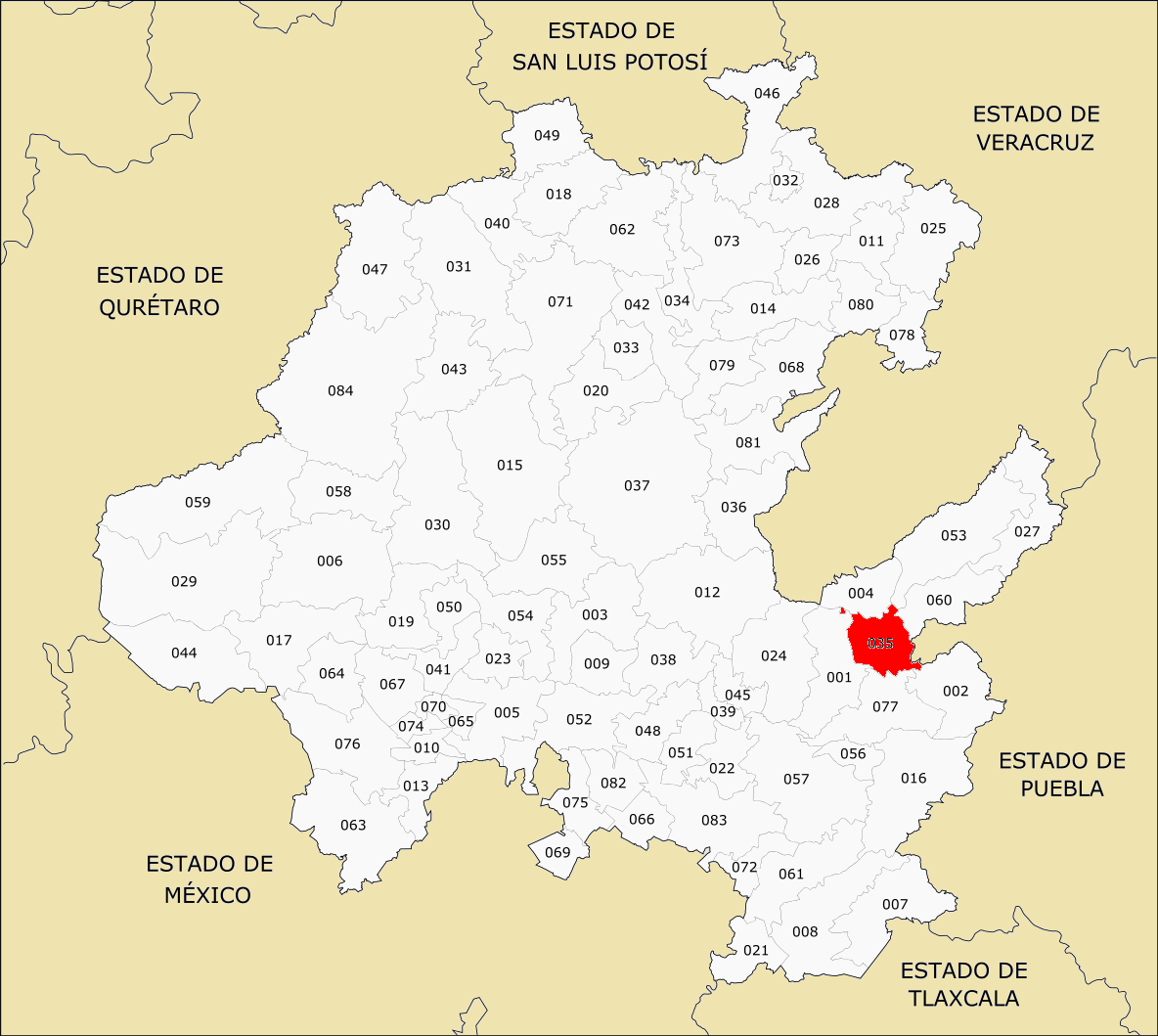 Municipios de Hidalgo